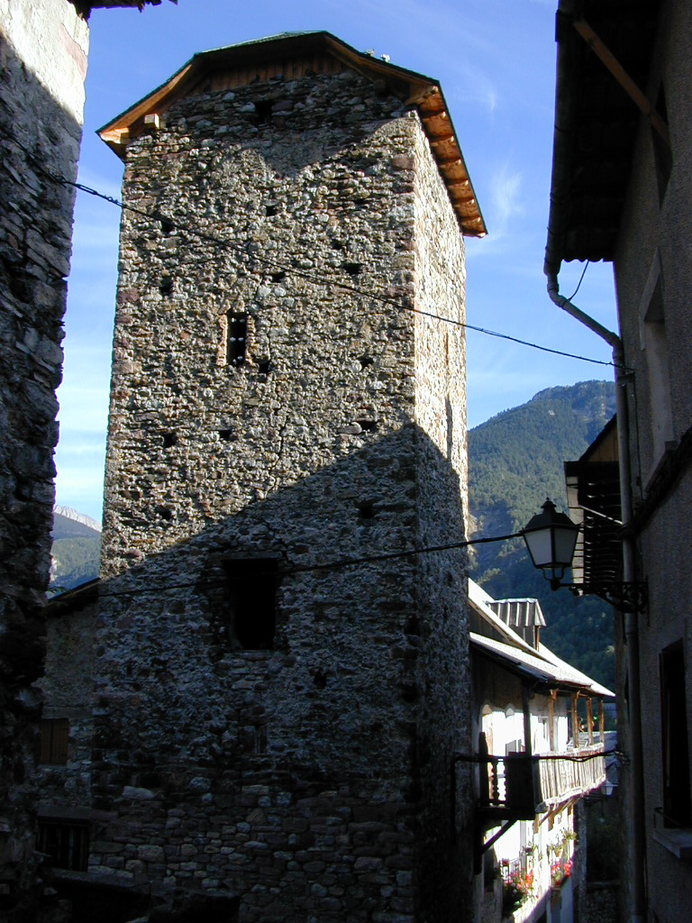 Torre de Casa Moliné con tejado a tres aguas, típico del valle de Chistau, Comarca de Sobrarbe